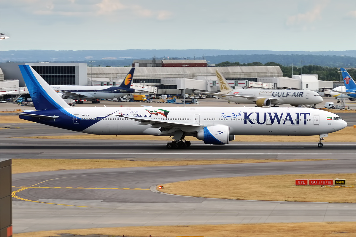 Kuwait Airways, 9K-AOH, Boeing 777-369 ER